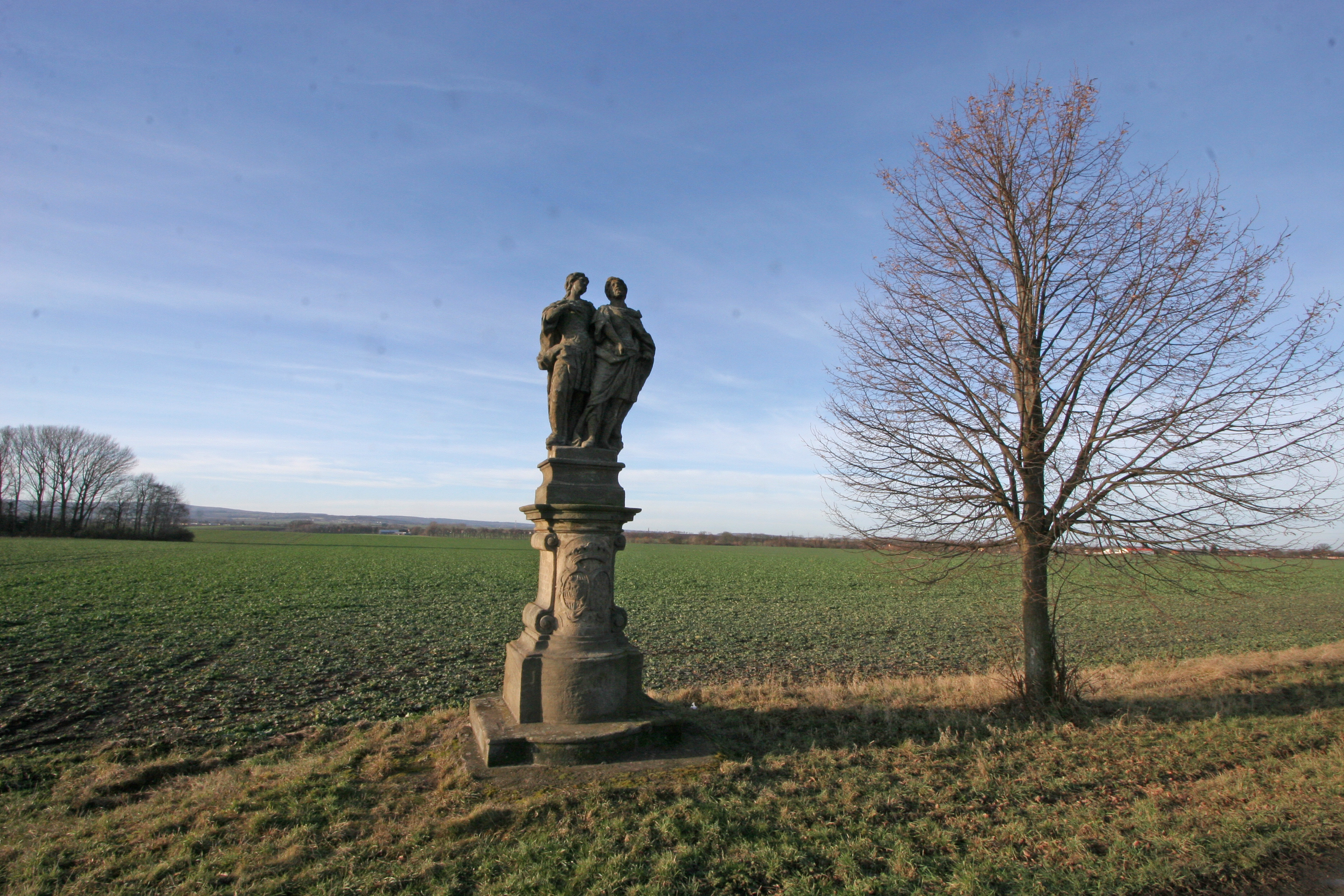 Sousoší sv. Jana a sv. Pavla (Medlešice), při cestě k Dřenicím, Medlešice